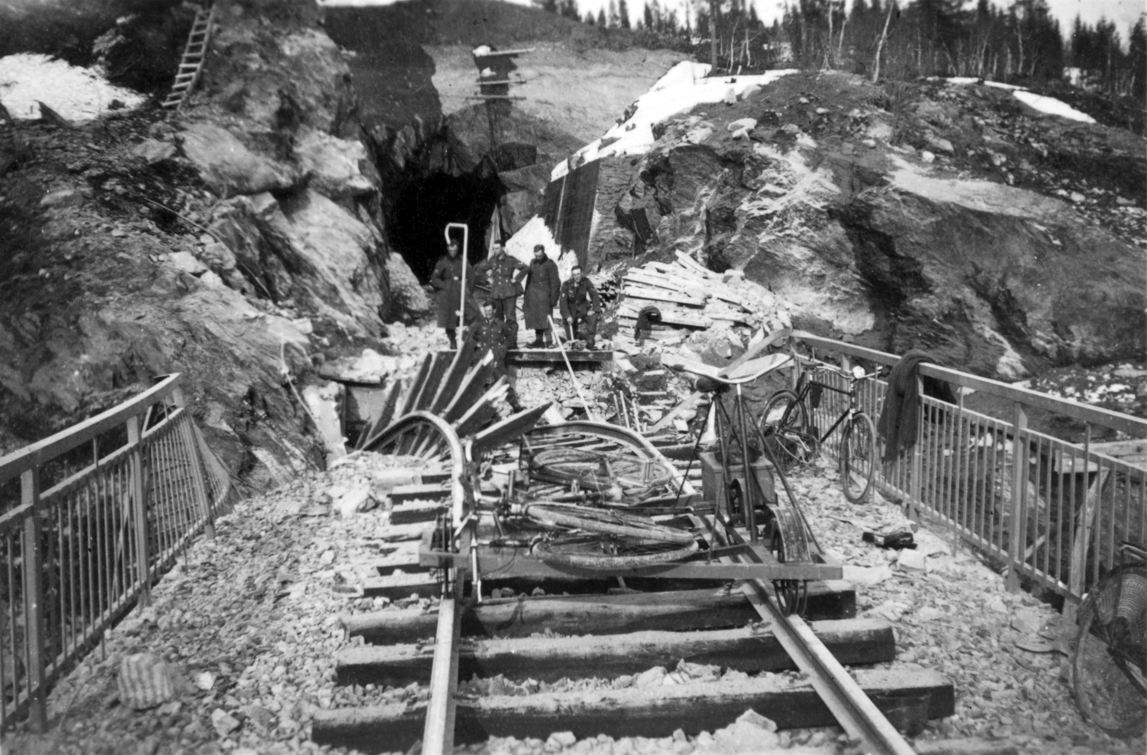 Sprengt bru ved Brekkvasselv Tittel / Title: 6.mai (?) 1940 Utpå kvelden nådde de første bergjegeravdelingene Brekkvasselv jernbanestasjon. Der var linjene sprengt ved brua. Dato / Date: 6.05.1940 Fotograf / Photographer: Karl Marth Sted / Place: Brekkvasselv, Nord-Trøndelag, Norge Eier / Owner Institution: Arkiv i Nordland Lenke / Link: Arkiv i Nordland Arkivreferanse /Archive reference: AIN.NA143.0113 Fra Dag Skogheims Privatarkiv Tekst bak på bildet: Brekkvasselv Text: 6. mai 1940 utpå kvelden nådde de første bergjegeravdelingene Brekkvasselv jernbanestasjon. Der var linjene sprengt ved brua. 5/6 mai 1940